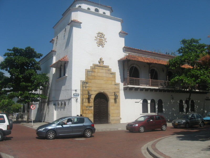 Club Unión Girardot Cundinamarca (Colombia).